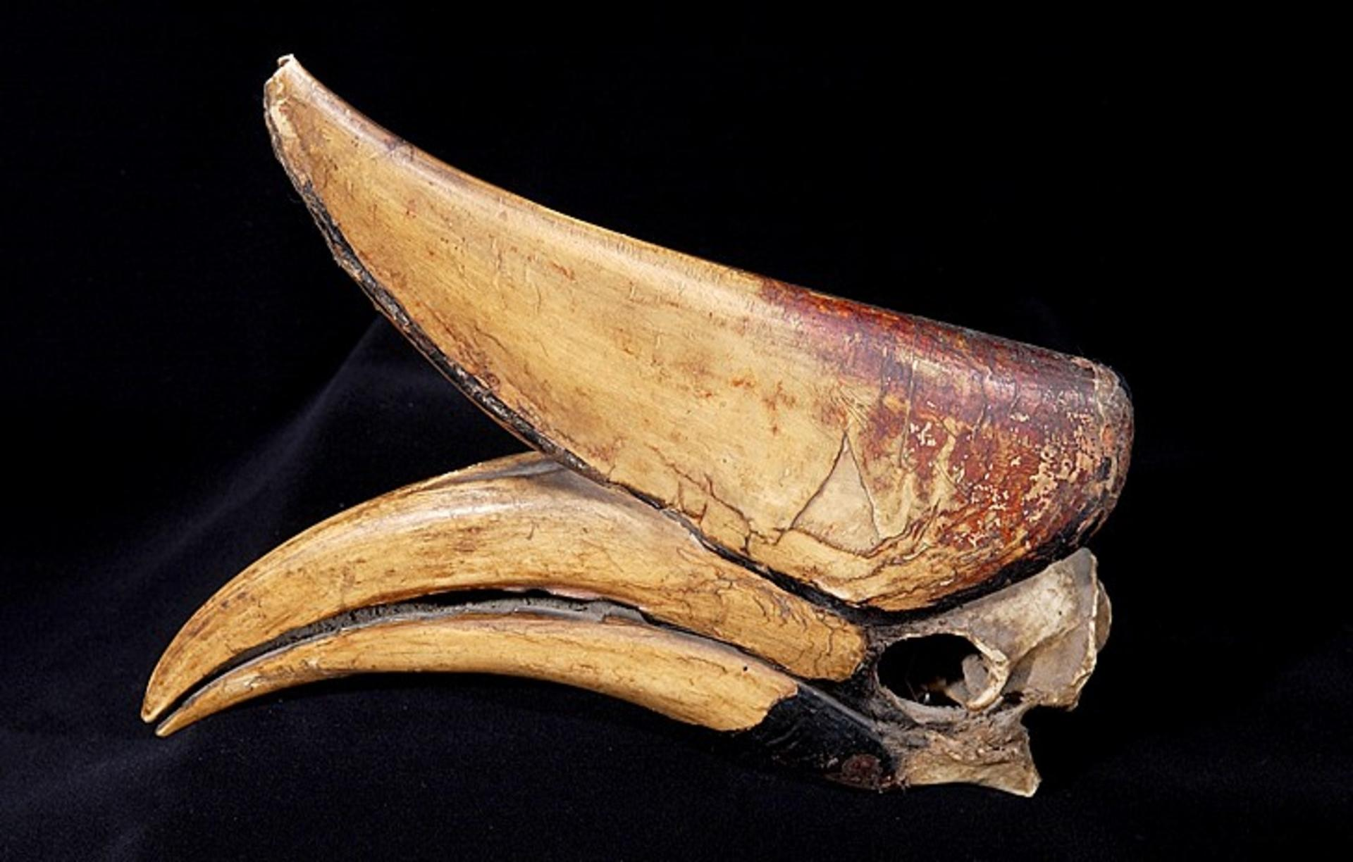 Buceros rhinoceros silvestris Vieillot, 1816